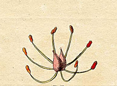 Ausschnitt (Klasse VIII) aus Ehrets Tafel "Methodus Plantarum Sexualis"